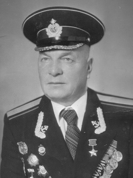 Павел Христофорович Дубинда - один из четырёх Героев Советского Союза, ставших также полными кавалерами ордена Славы.